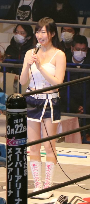 「WRESTLE WARS 2020」3.15東京・大田区総合体育館大会 チアワン This file has been extracted from another file: W-120200315145214 IMG 7093.jpg